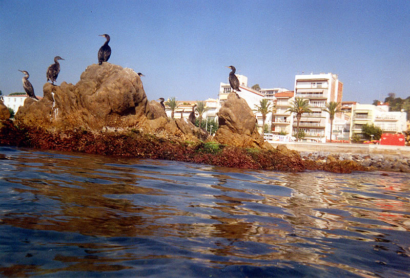 Cormorans a Sa Palomera